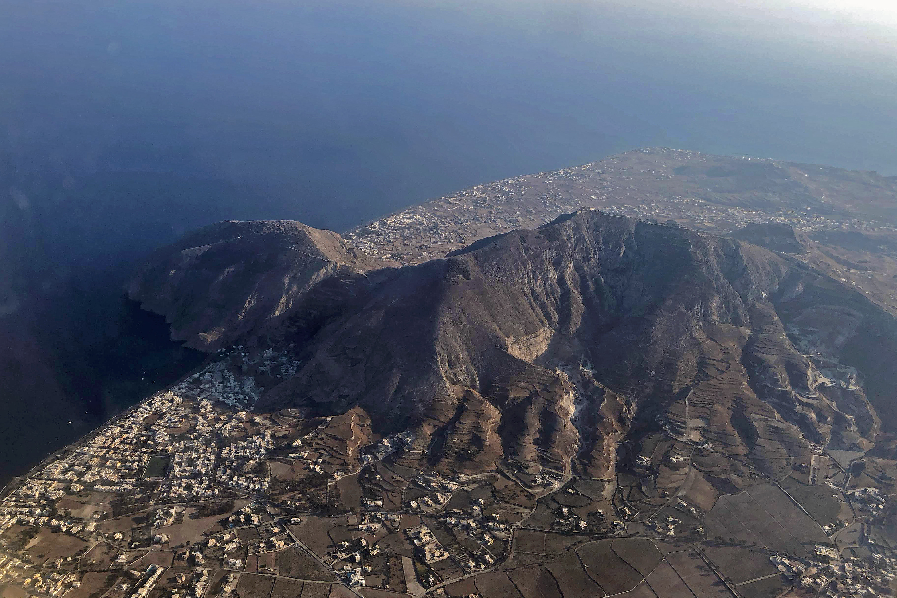 Vista aerea dell'isola di Santorini con particolare del monte Profitis Illas e delle cittadine di Kamari (a sinistra) e Perissa (destra).